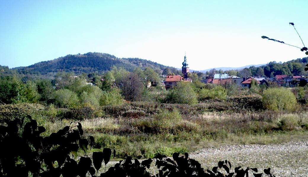 Widok Zembrzyc z drogi prowadzącej do Suchej Beskidzkiej. My own work. 2006. Suwaj Wladyslaw